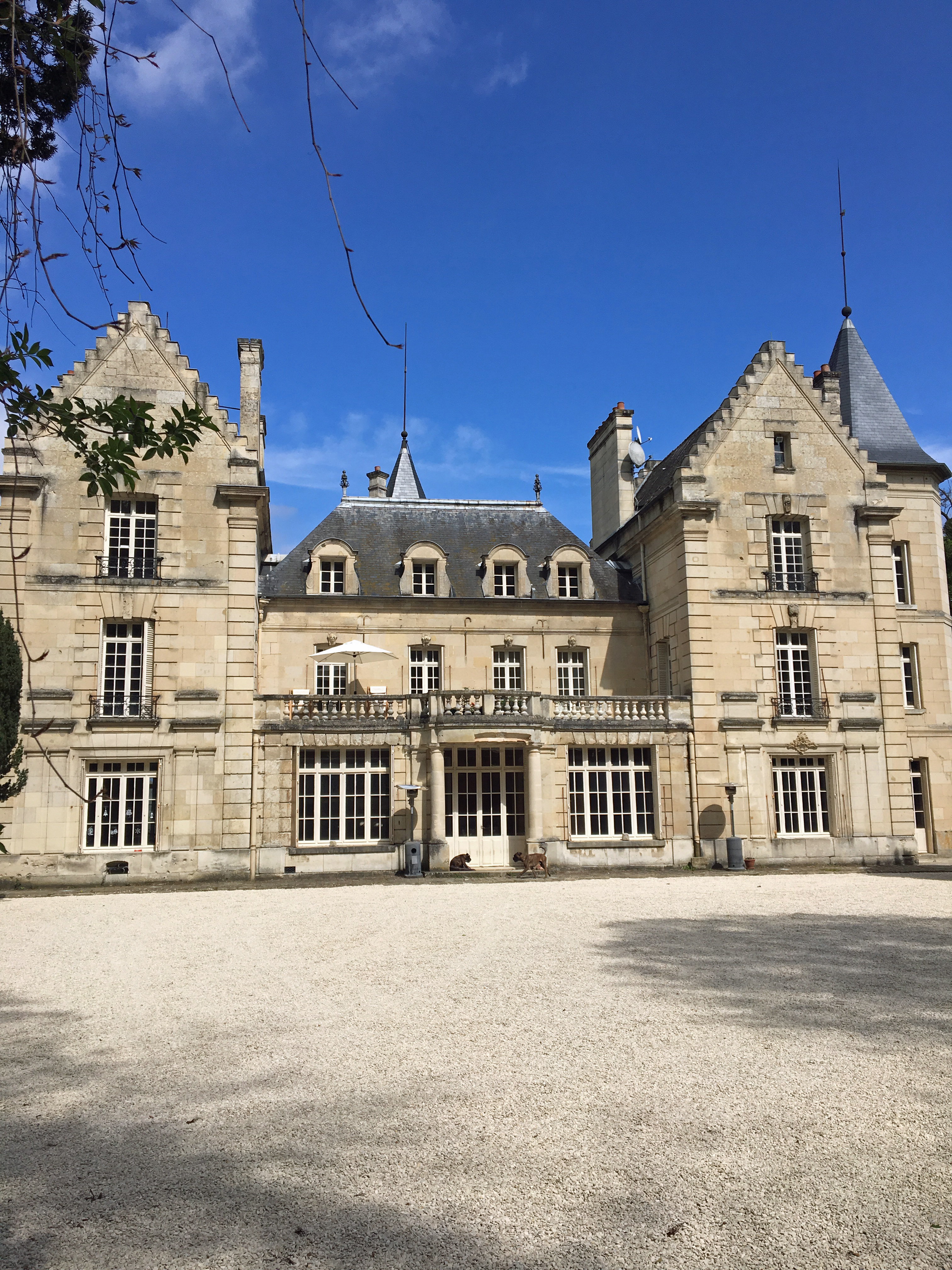 Château de Montois